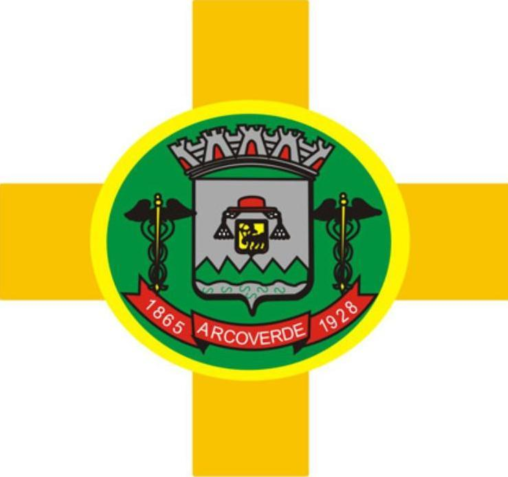 Brasao de Arcoverde